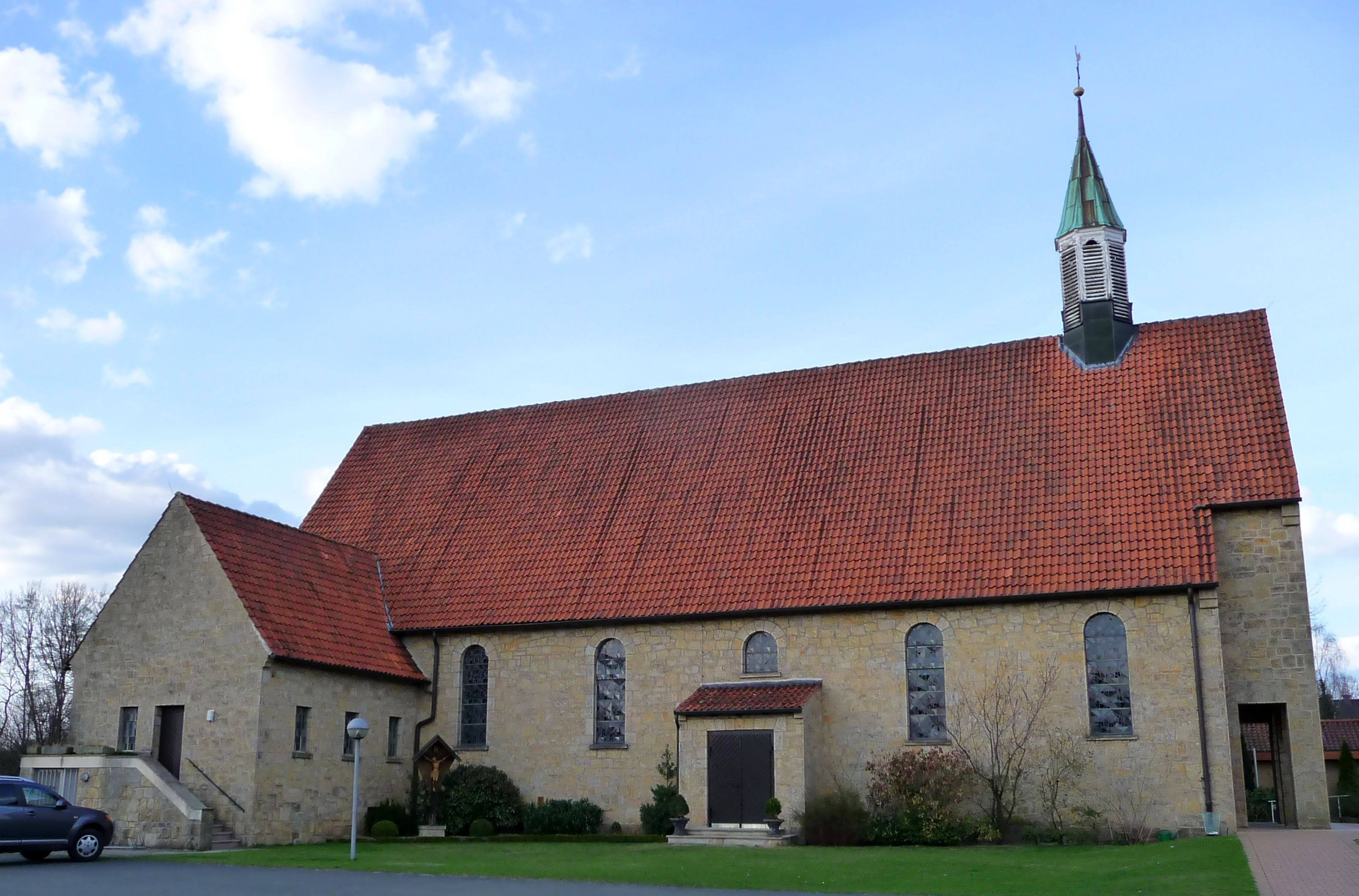 St.-Modestus-Kirche in Dörenthe, einem Stadtteil von Ibbenbüren im Kreis Steinfurt, Nordrhein-Westfalen, Deutschland.